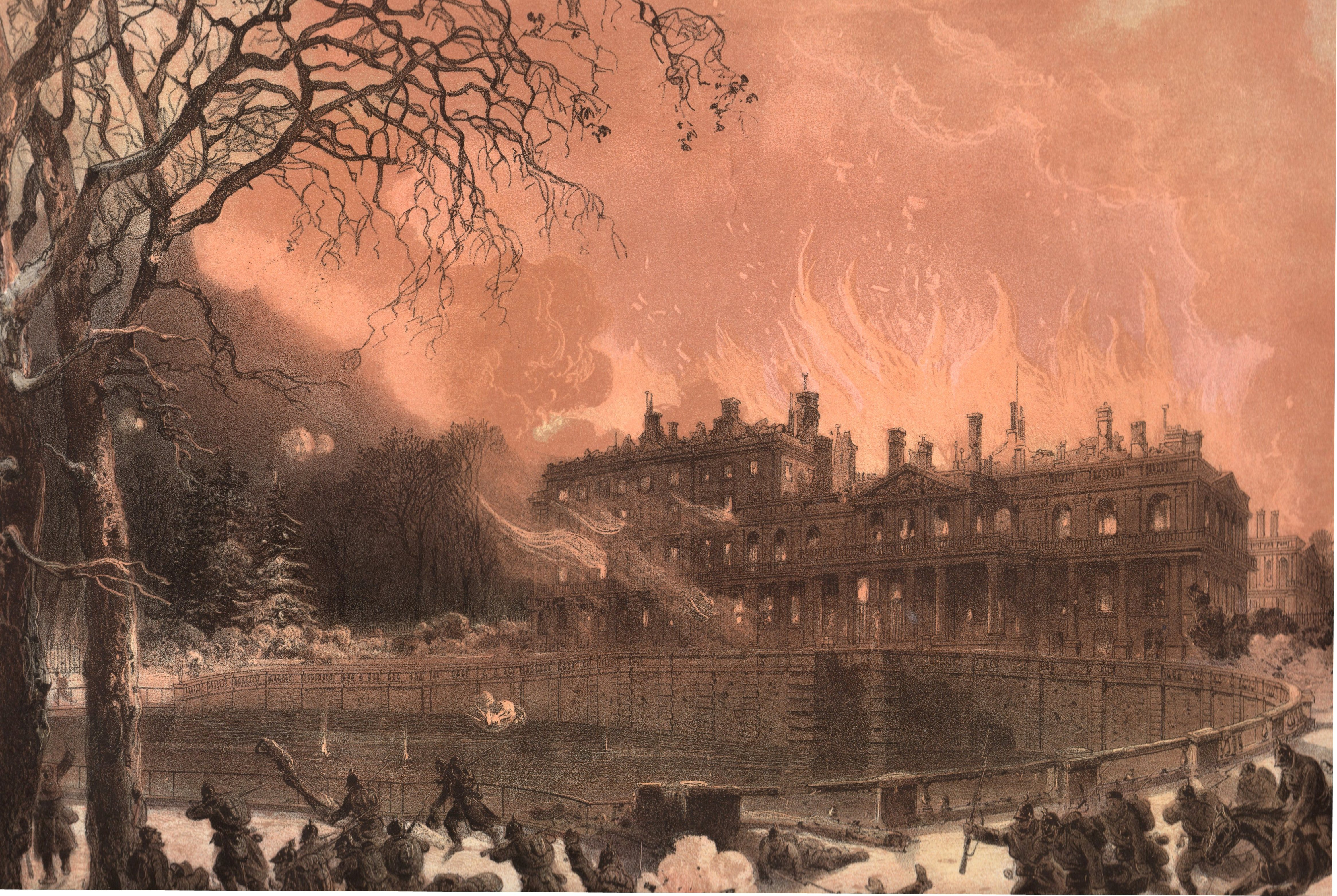 Scan d'une lithographie extraite de la collection Paris et ses ruines, Charpentier 1874, représentant le château de Saint-Cloud en flammes.